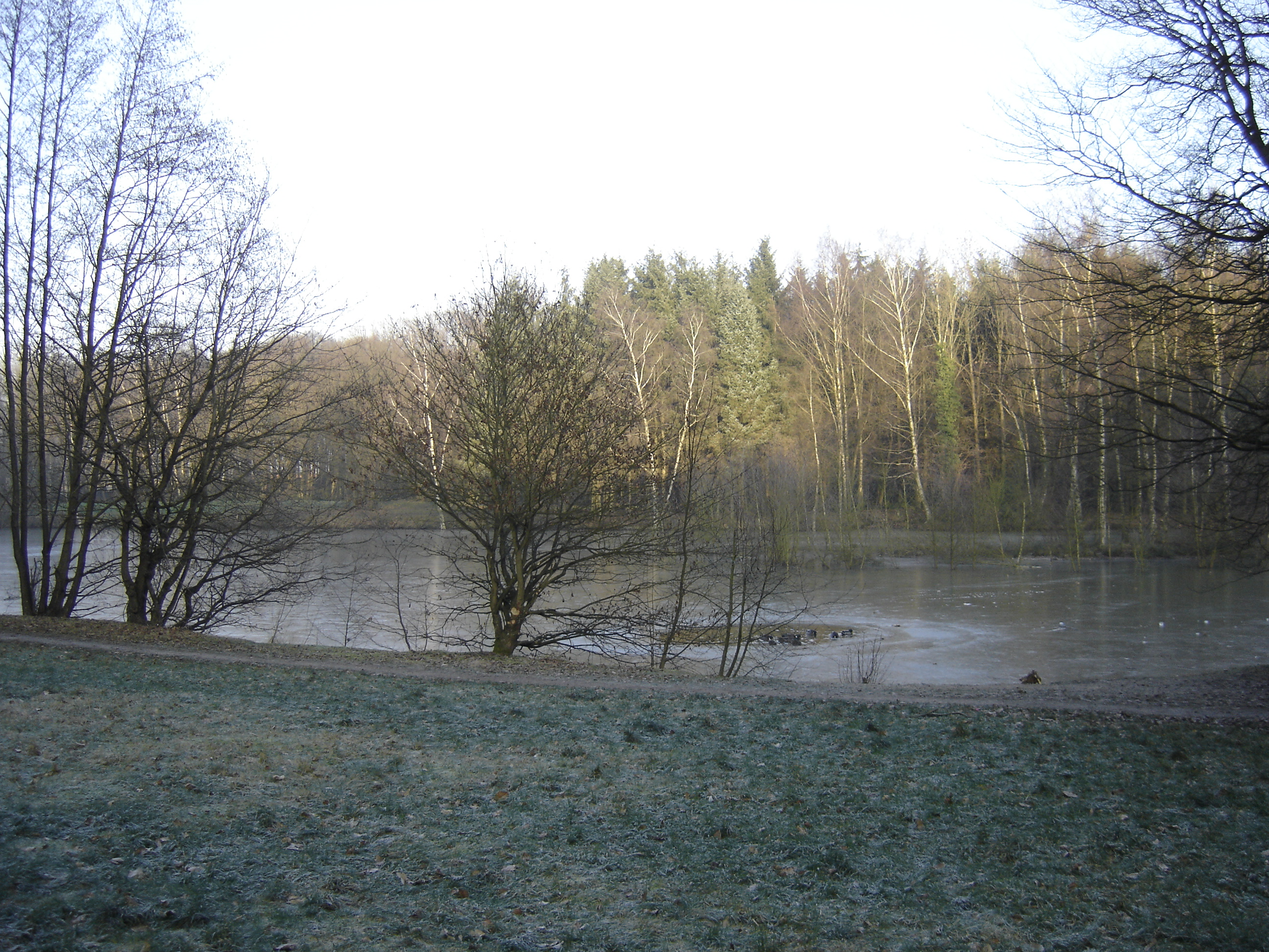 Étang du Flaquet Briffaut - Bois-l'Évêque (forêt) - Commune d'Ors - Département du Nord